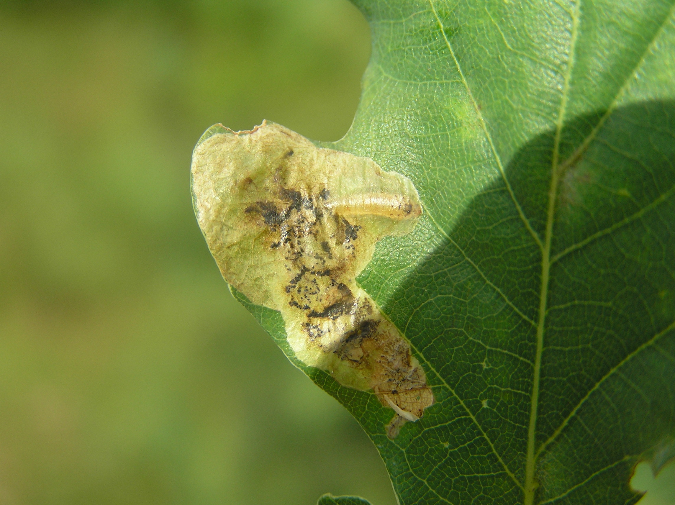 Tischeria complanella